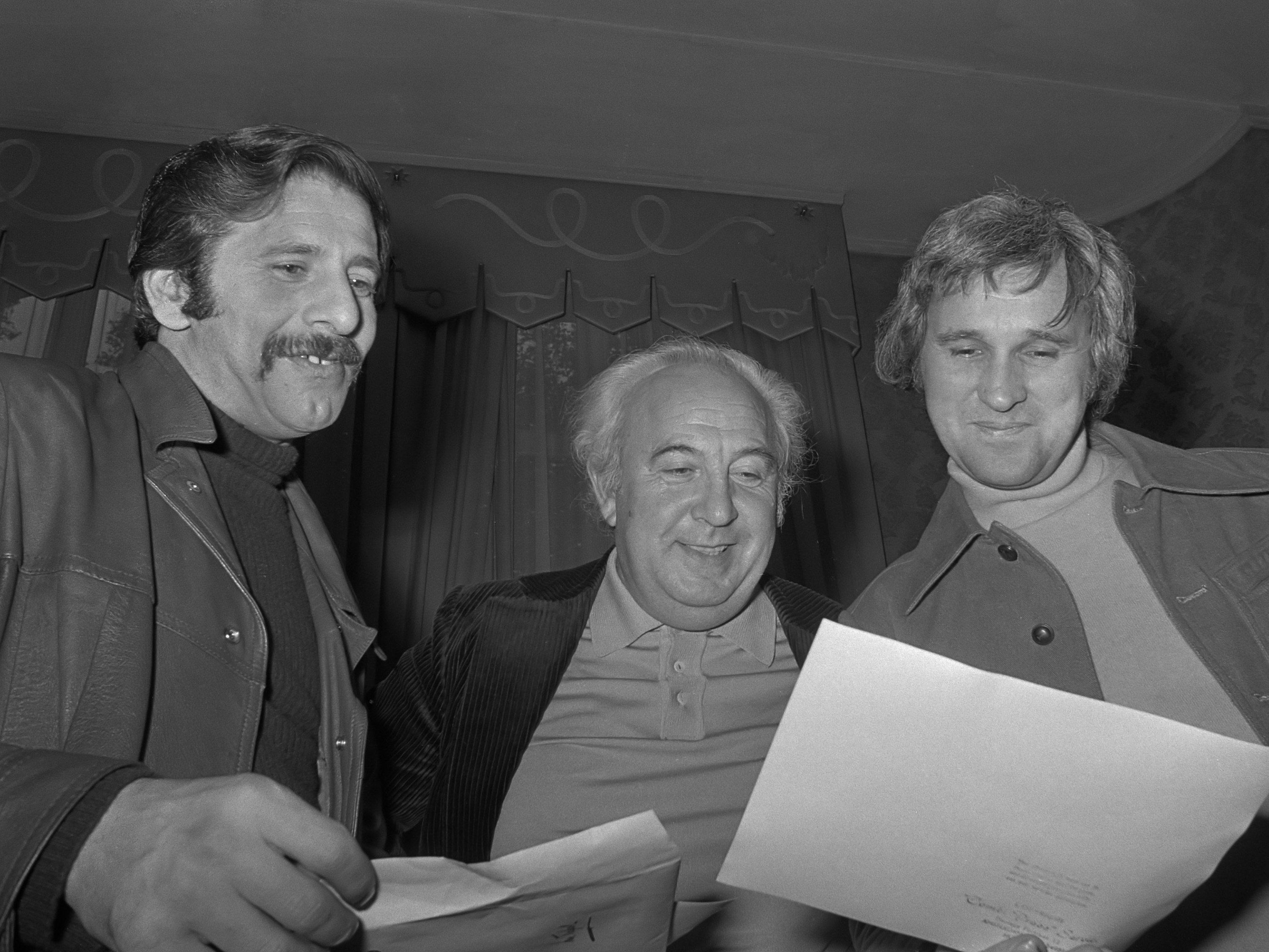 Film "Fiddler on the roof" in Tuschinsky Amsterdam, v.l.n.r Topol, Lex Goudsmit, Norman Jewison (regisseur) 21 oktober 1971